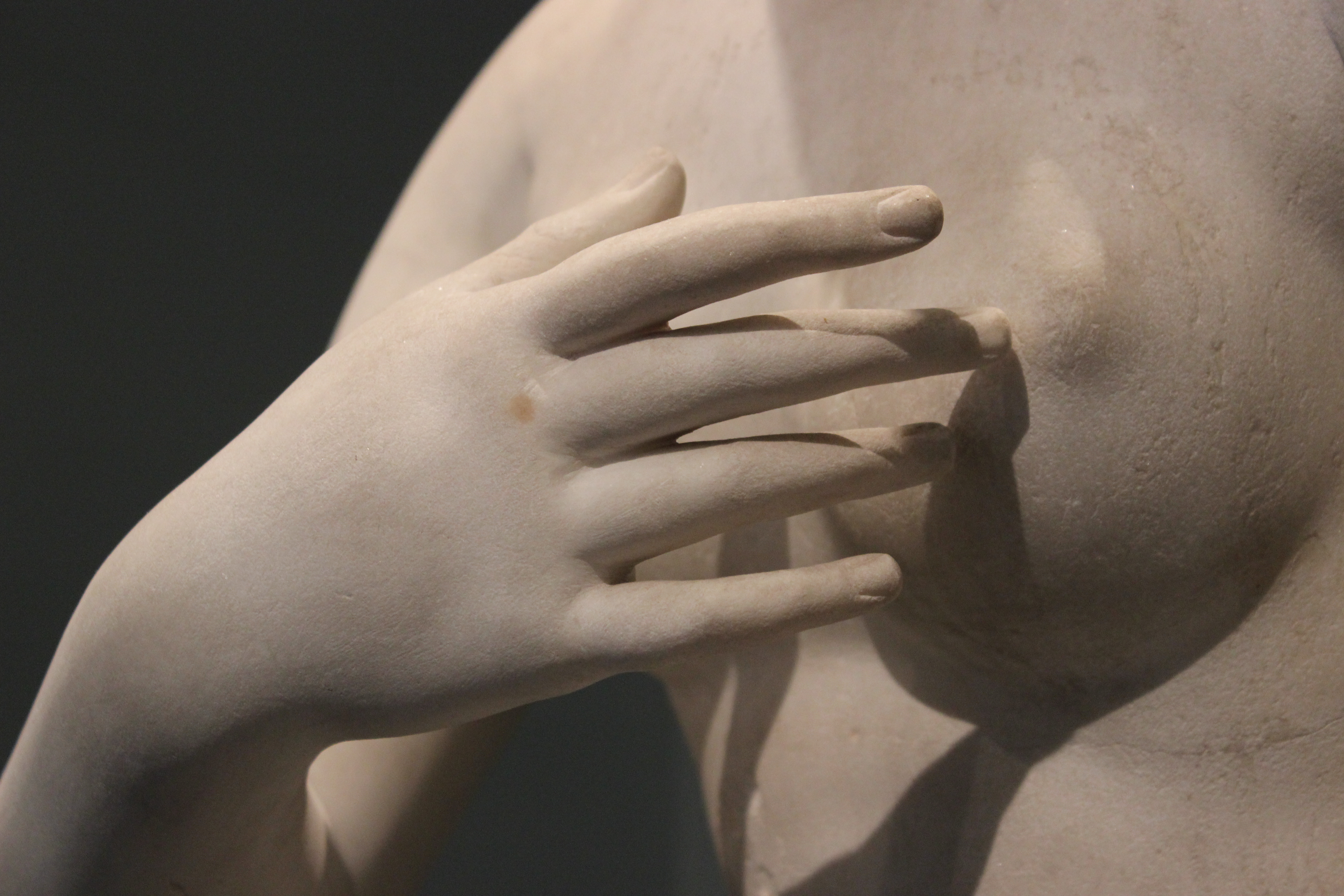 Roma. Palazzo Massimo alle Terme. Afrodita de la Tróade.